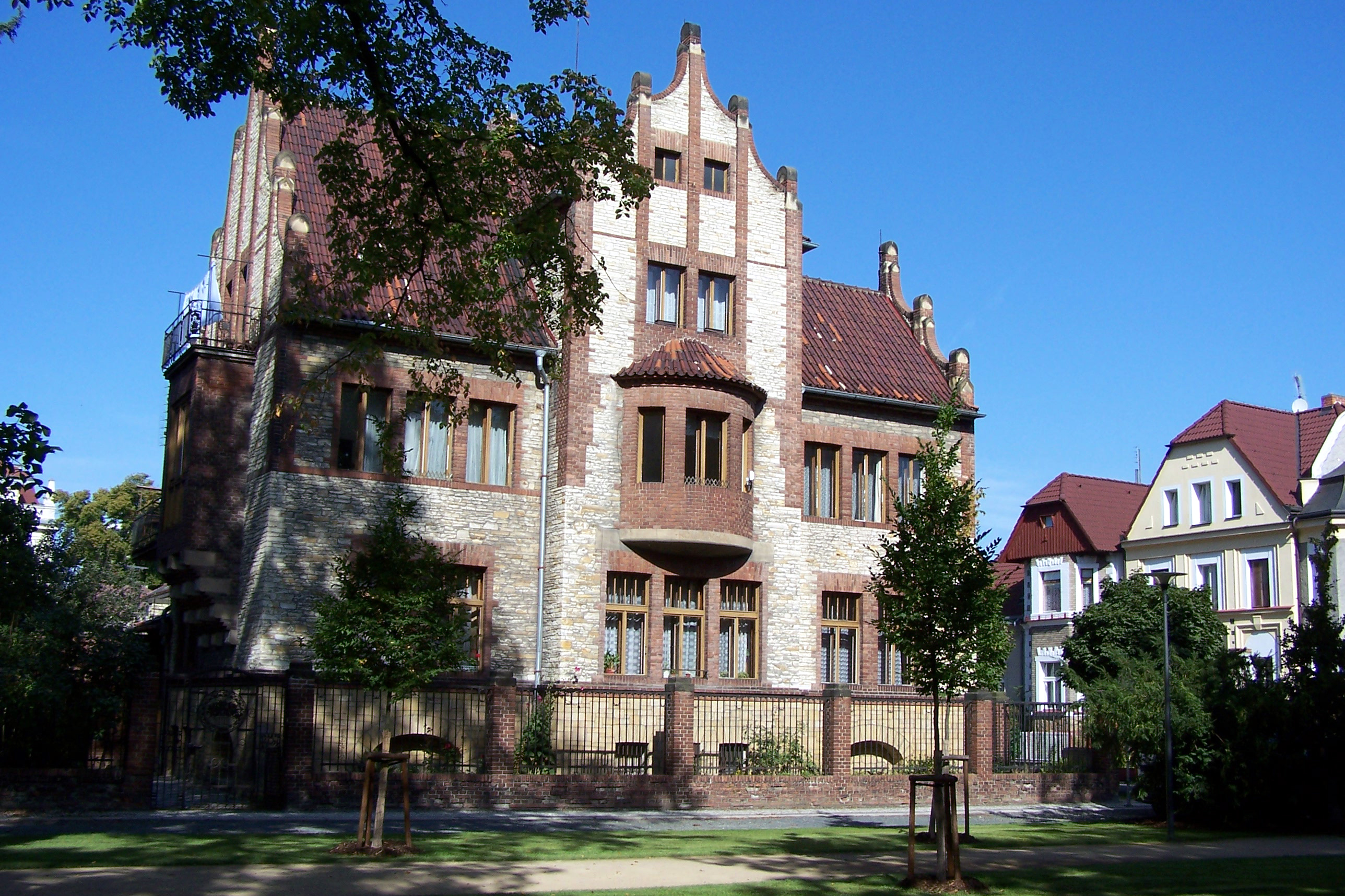 Vila Kouřimka v Poděbradech od arch. Josefa Fanty